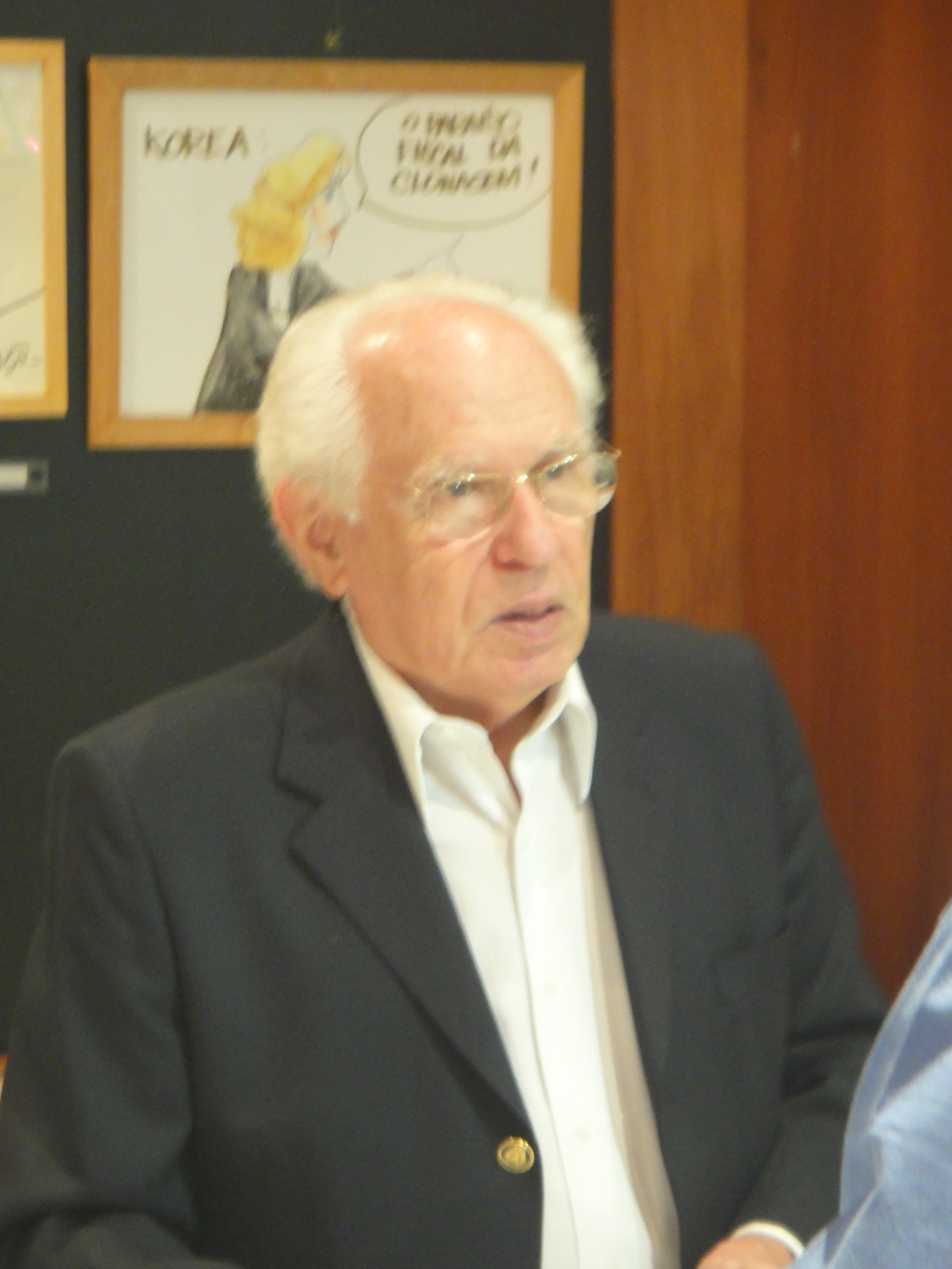 Foto de José Goldemberg minutos antes de ser entrevistado no Roda Viva no dia 4 de abril de 2012.